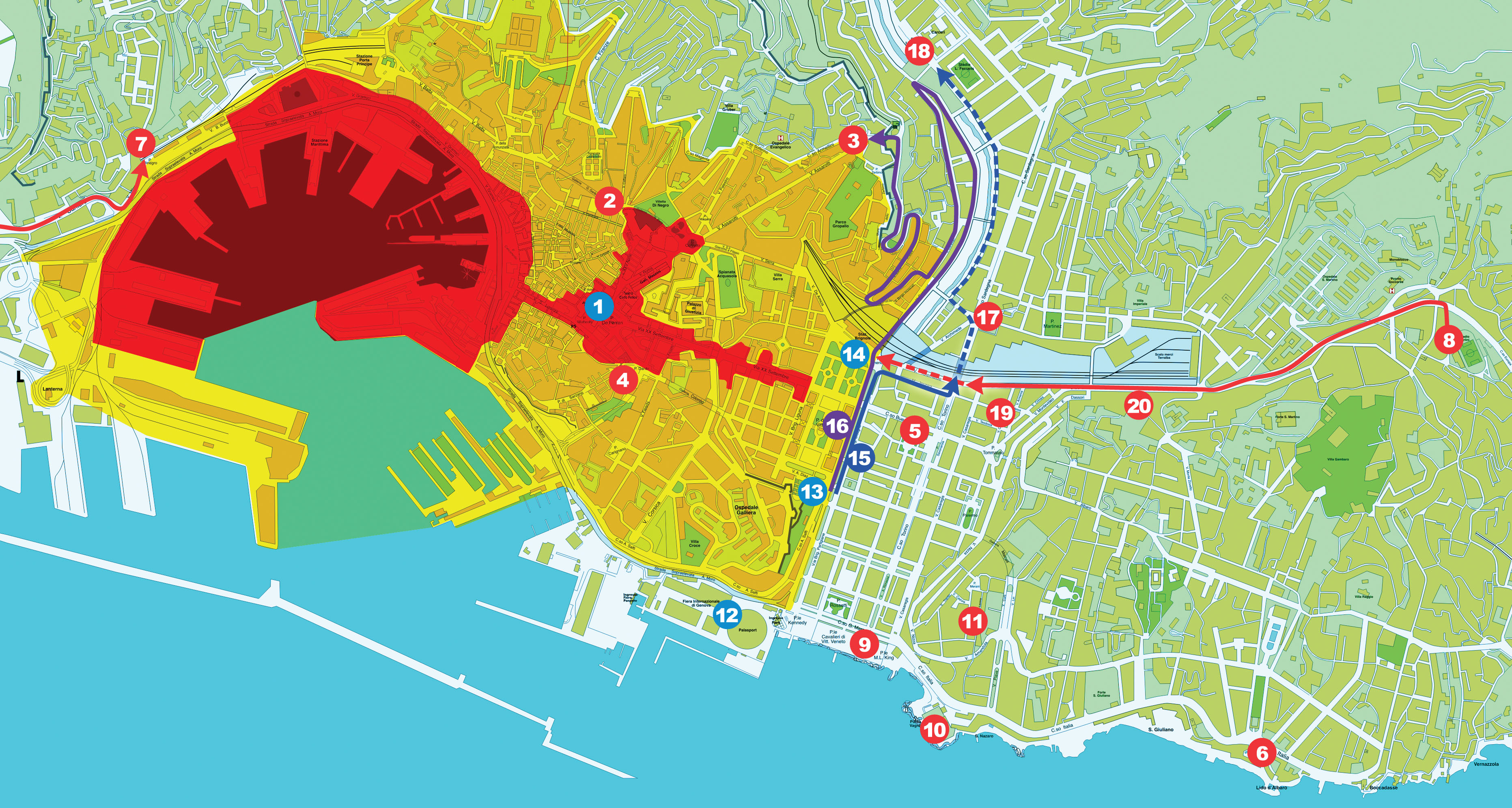 Mappa della città di Genova durante il vertice del G8 nel 2001. I colori indacano le diverse aree con restrizioni d´accesso: zona rossa e zona gialla. 1: Palazzo Ducale - sede del Vertice G8 (where the G8 summit took place) - Le piazze del Genoa Social Forum (GSF meeting points and demos). 2: piazza Portello. 3: piazza Manin. 4: piazza Dante. 5: piazza Paolo da Novi. 6: Boccadasse. 7: Arrivo del corteo dei sindacati di base (end of the free unions demo). 8: Partenza del corteo della disubbidienza civile - Tute Bianche (TB) (starting point of the civil disobedience). 9: piazzale M. L. King - GSF convergence center. 10: Punta Vagno - GSF public forum. 11. Scuole Diaz - GSF media center. 12: Fiera - “cittadella” delle Forze dell'ordine (temporary housing for Police Forces). 13: Questura (Police HQ). 14: piazza delle Americhe - dove sarebbe dovuto arrivare il corteo delle TB (where the TB demo should have ended). 15: percorso (route of) Mondelli + carabinieri BTG. “Lombardia”. All’incrocio con via Tolemaide si fermano e attaccano il corteo delle TB (at the Via Tolemaide intersection carabinieri forces stop, and attack the TB demo). 16: percorso (route of) Pagliazzo Bonanno + reparti mobili PS. In Piazza Manin caricano i pacifisti della Rete Lilliput (Police anti riot-units led by Pagliazzo Bonanno attack the Lilliput Net pacifists in Piazza Manin). 17: piazza Giusti, attacco al supermercato “DìxDì” (“DìxDì” supermarket attacked). 18: Marassi, attacco al carcere (the Marassi prison attacked). 19: piazza Alimonda, uccisione di Carlo Giuliani (where Carlo Giuliani was killed). 20: corso Gastaldi e via Tolemaide, carica finale e pestaggi (final police attack and beatings).